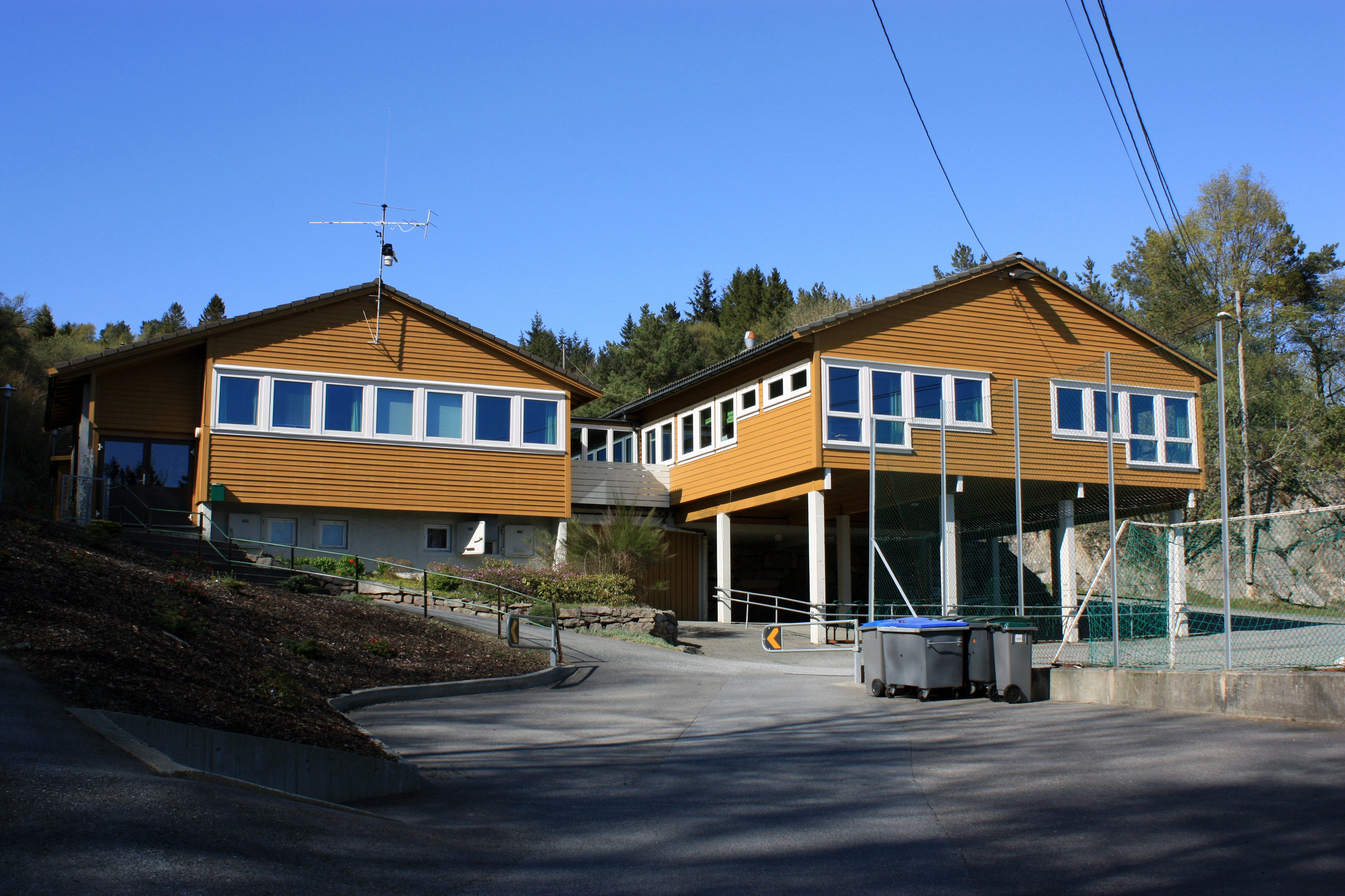 Krokeide skole, Fana, Bergen.